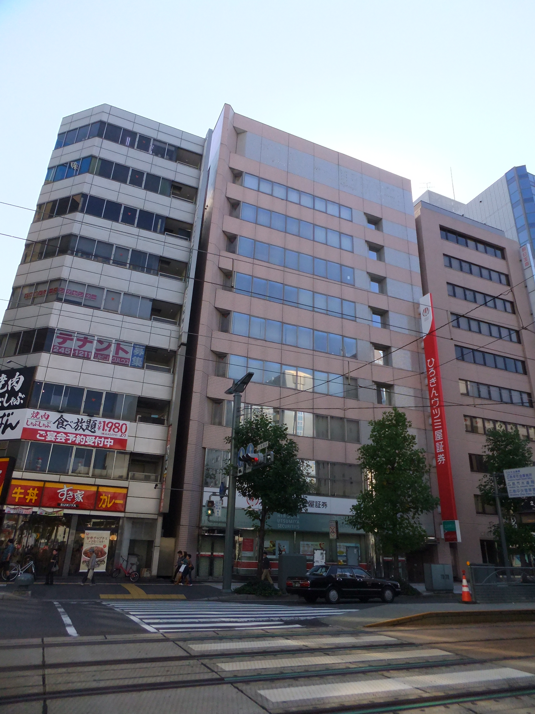 ひろぎんウツミ屋証券本社